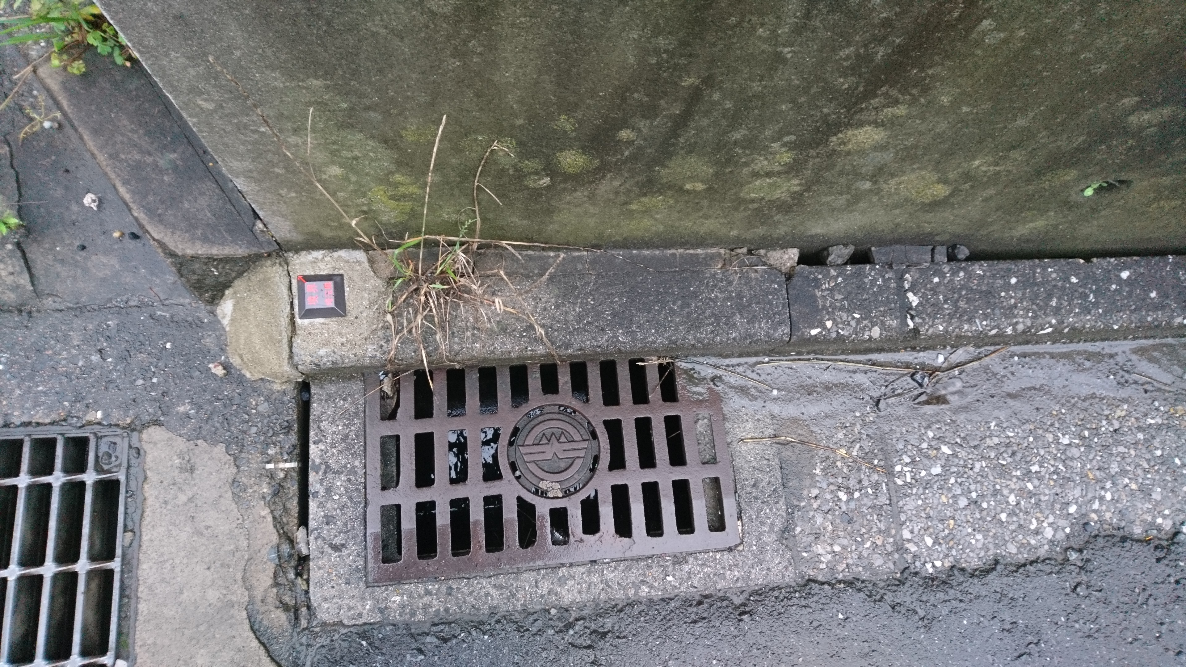 県道区域を示す道路鋲の内側に和光市の側溝蓋がある 令和元年７月撮影